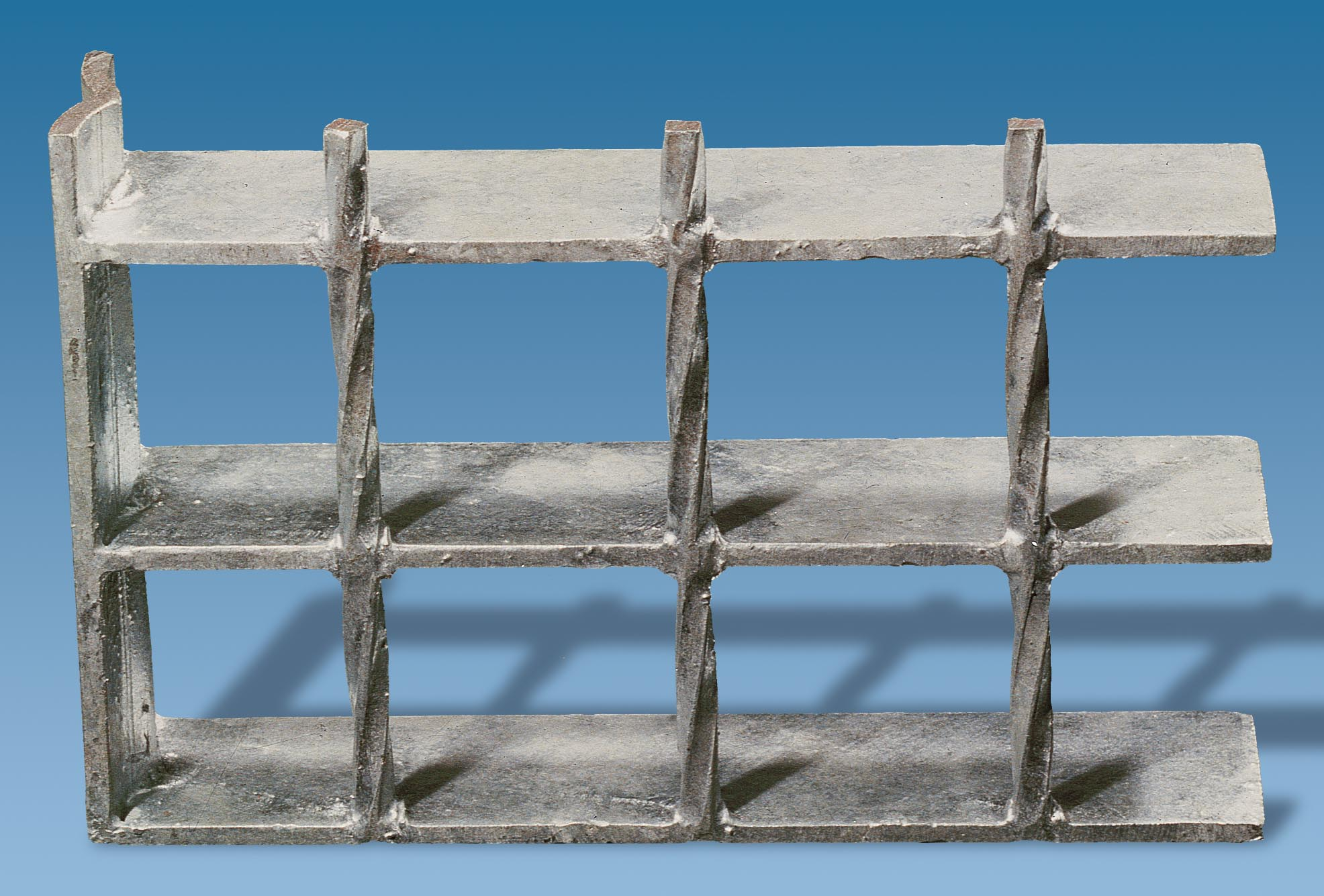 Rejilla electrosoldada con pletina portantes, varillas separadoras y el marco